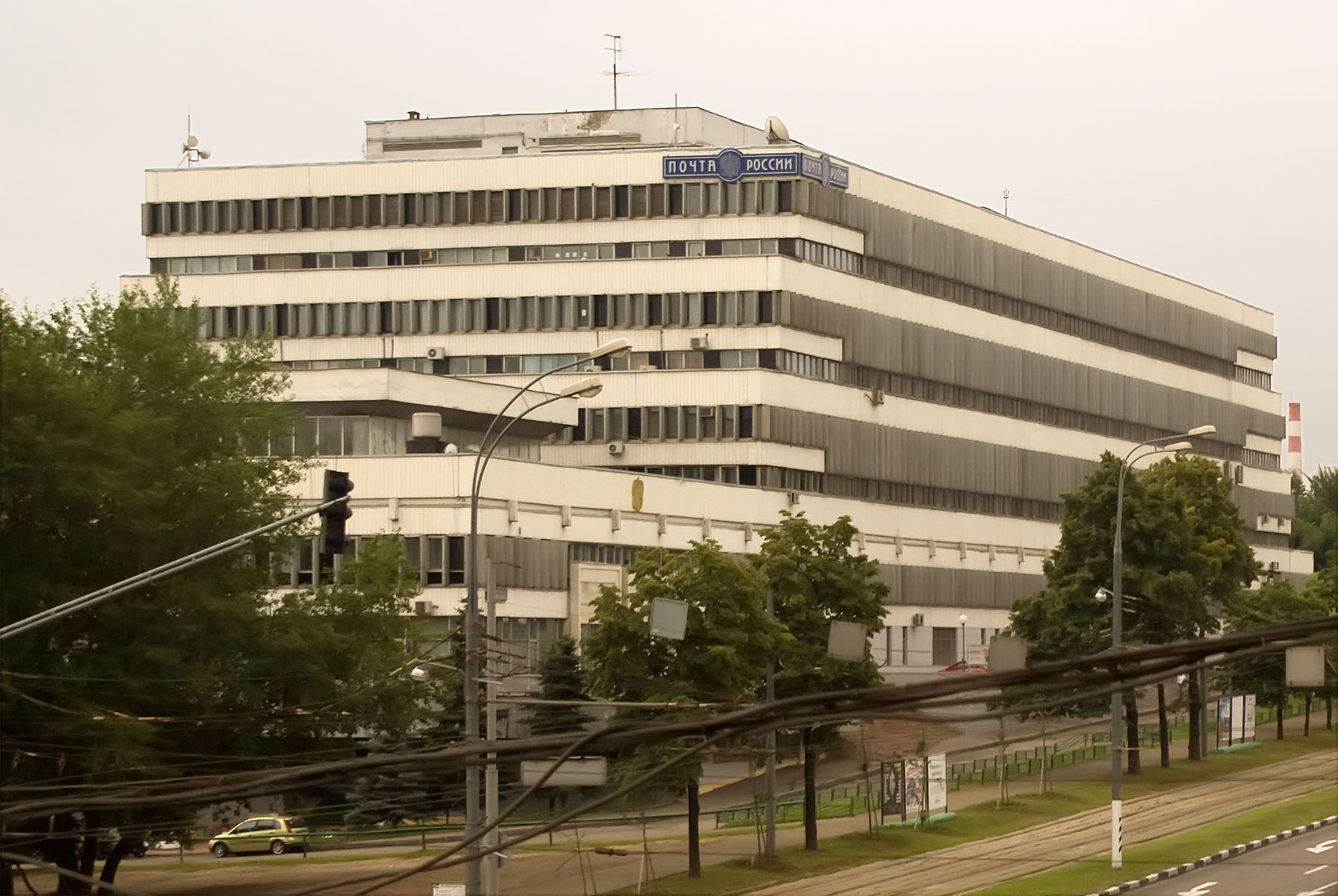 Центральный офис ФГУП "Почта России"